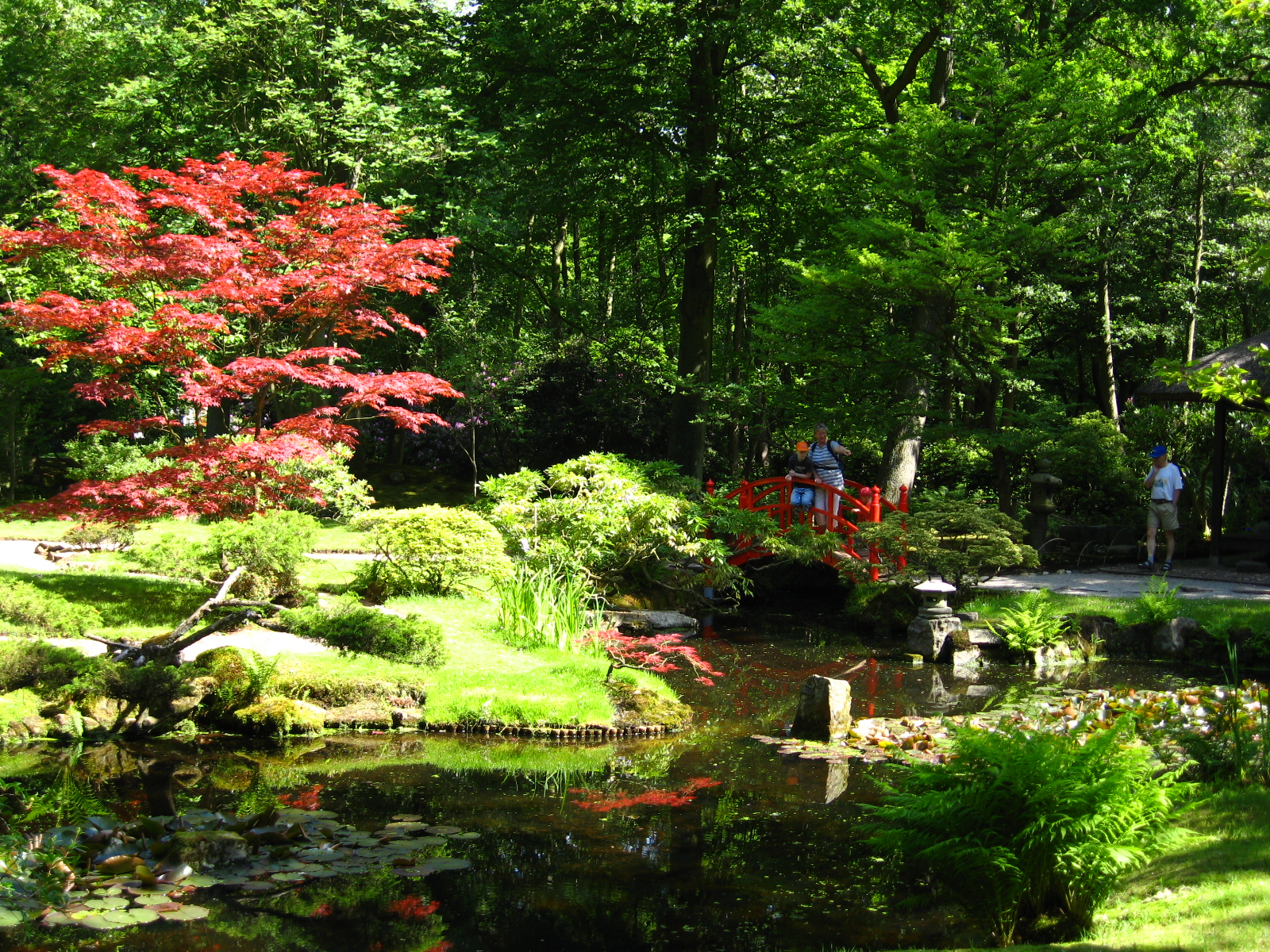 Japanse tuin op landgoed Clingendael.